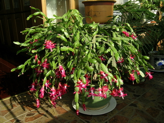 蟹爪兰 smartneddy 2004年12月摄